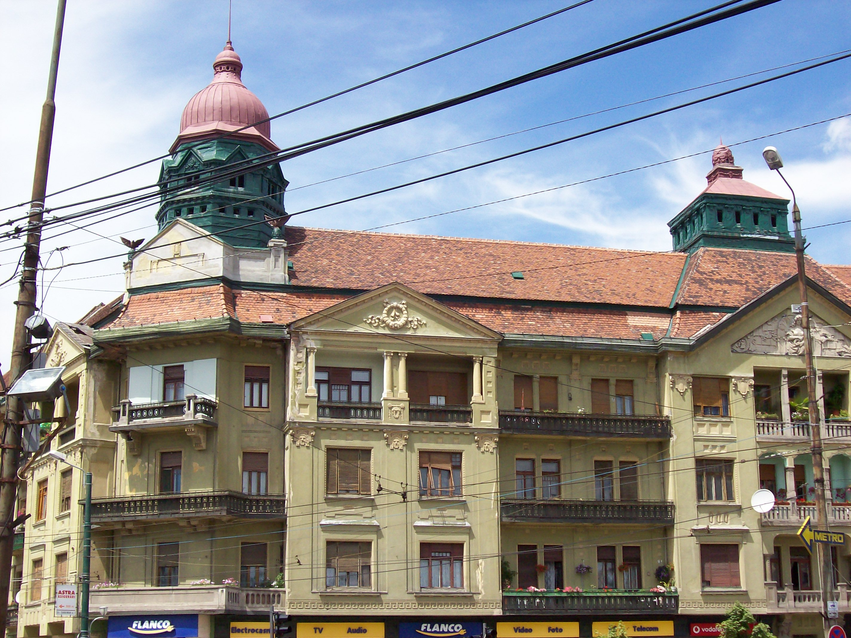 Széchenyi Palace, Victory Square, Timişoara, Romania. László Székely, 1913.